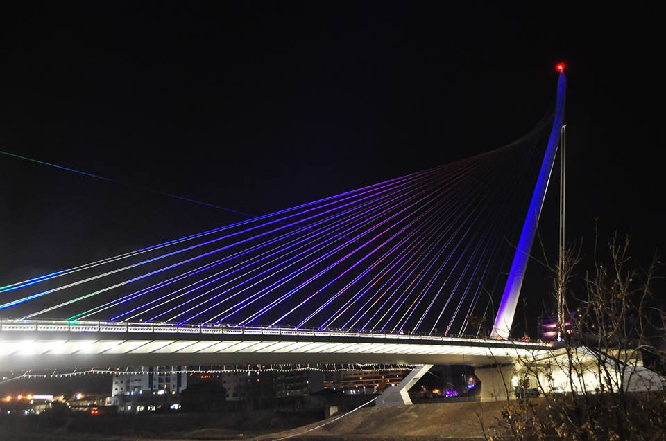 Veduta del Ponte di San Francesco da Paola a Cosenza, progettato dall'architetto spagnolo Santiago Calatrava.